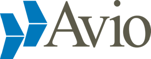 Marchio AVIO introdotto nel 2003, dopo la vendita da parte di Fiat AVIO